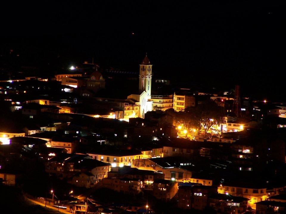 FOTOGRAFIA BELEN DE UMBRIA NOCTORNO tomada por Alirio Murillo Hoyos